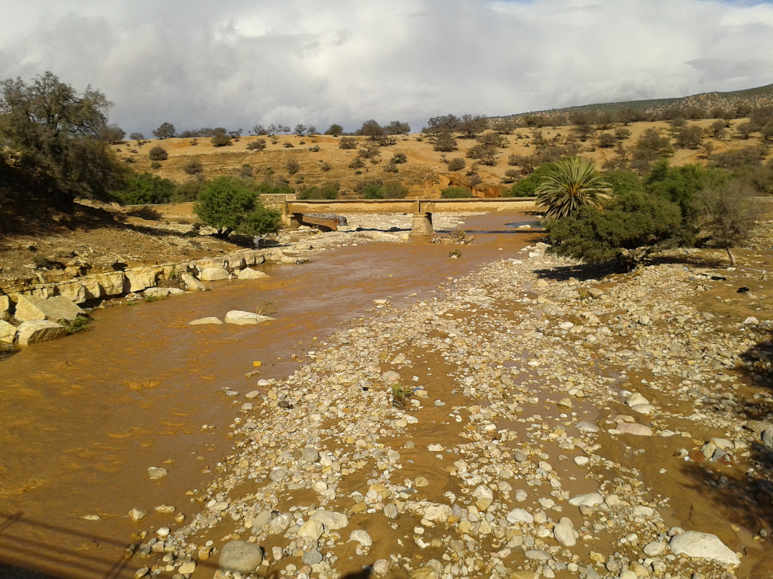 صورة تطل على واد سمسمو